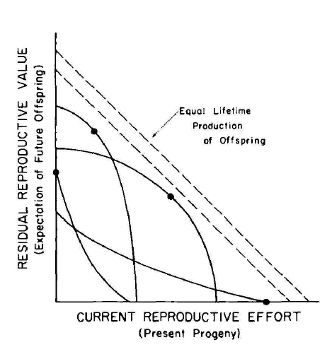 Modèle d’optimisation consistant à maximiser les bénéfices chez les semelpars et itéropares